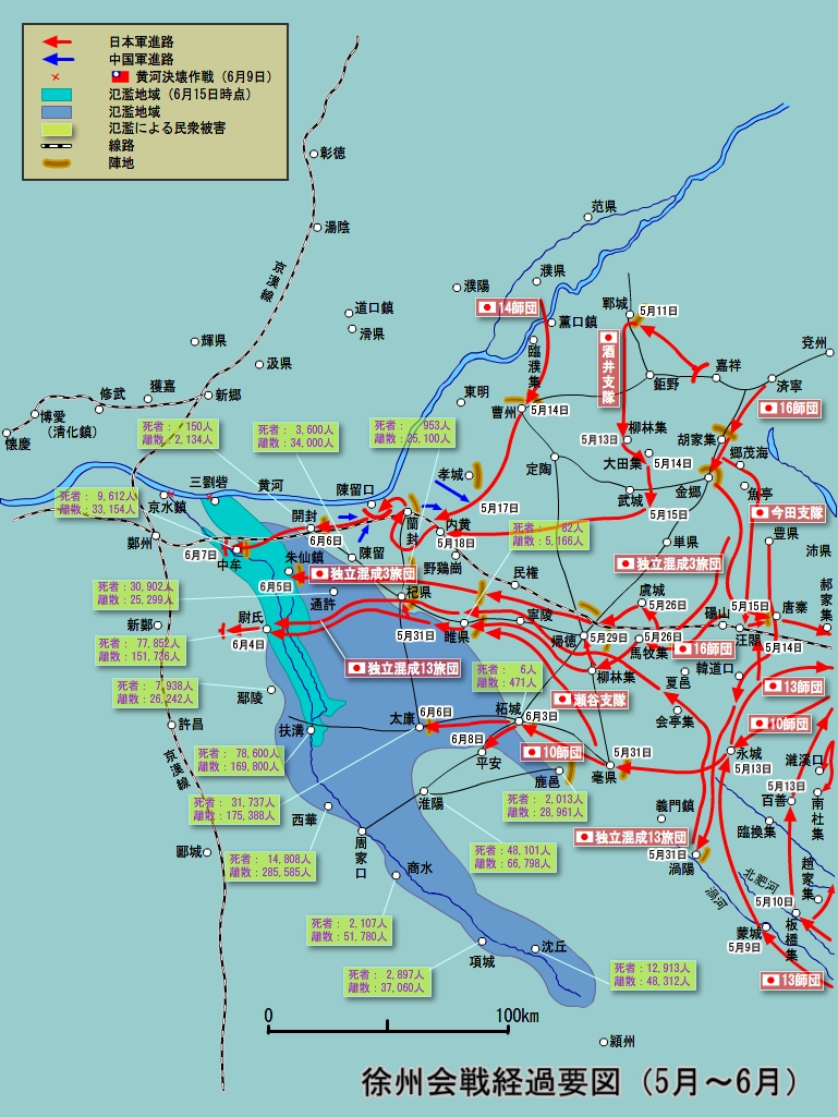 徐州戦闘経過要図 1938年5月〜6月